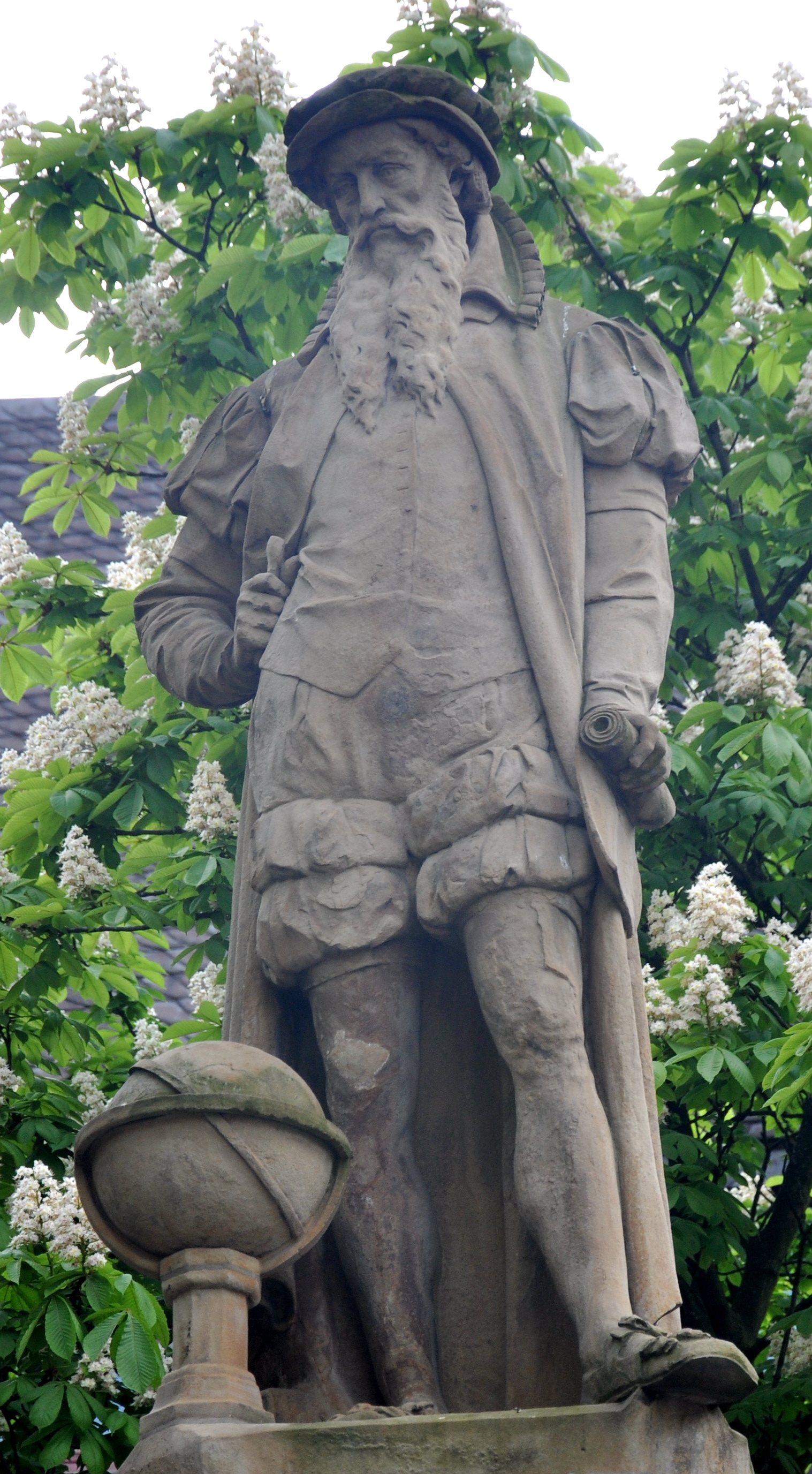 Duisburg, Mercatorbrunnen (von Joseph Reiss, 1878) vor dem Rathaus am Burgplatz Mercator-Statue